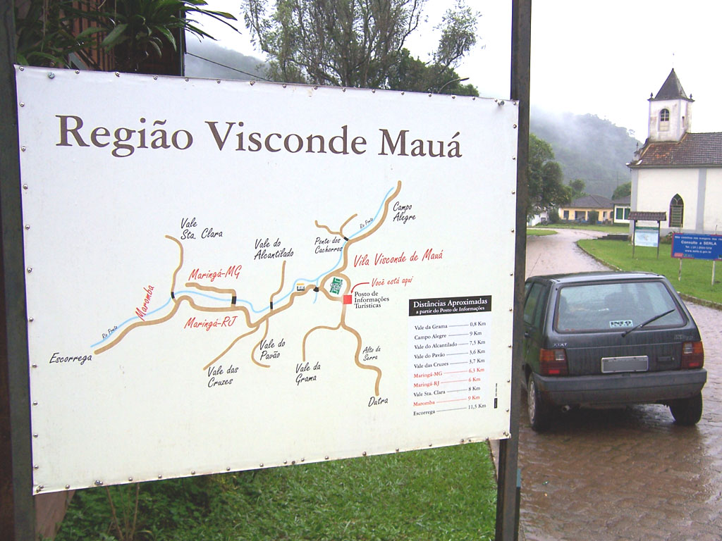 Foto do mapa localizado ao lado do centro de informações turísticas de Visconde de Mauá